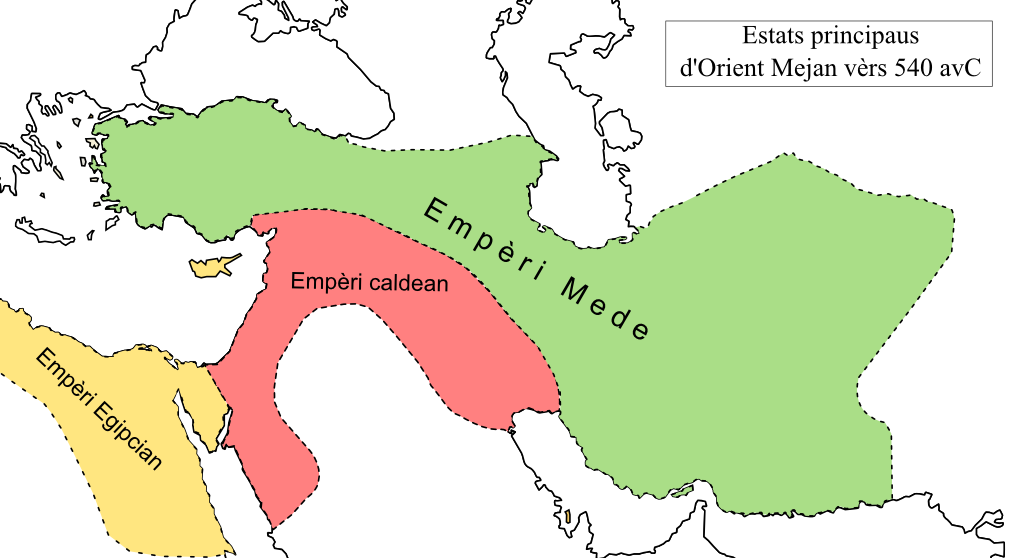 Orient Mejan vèrs 540 avC.